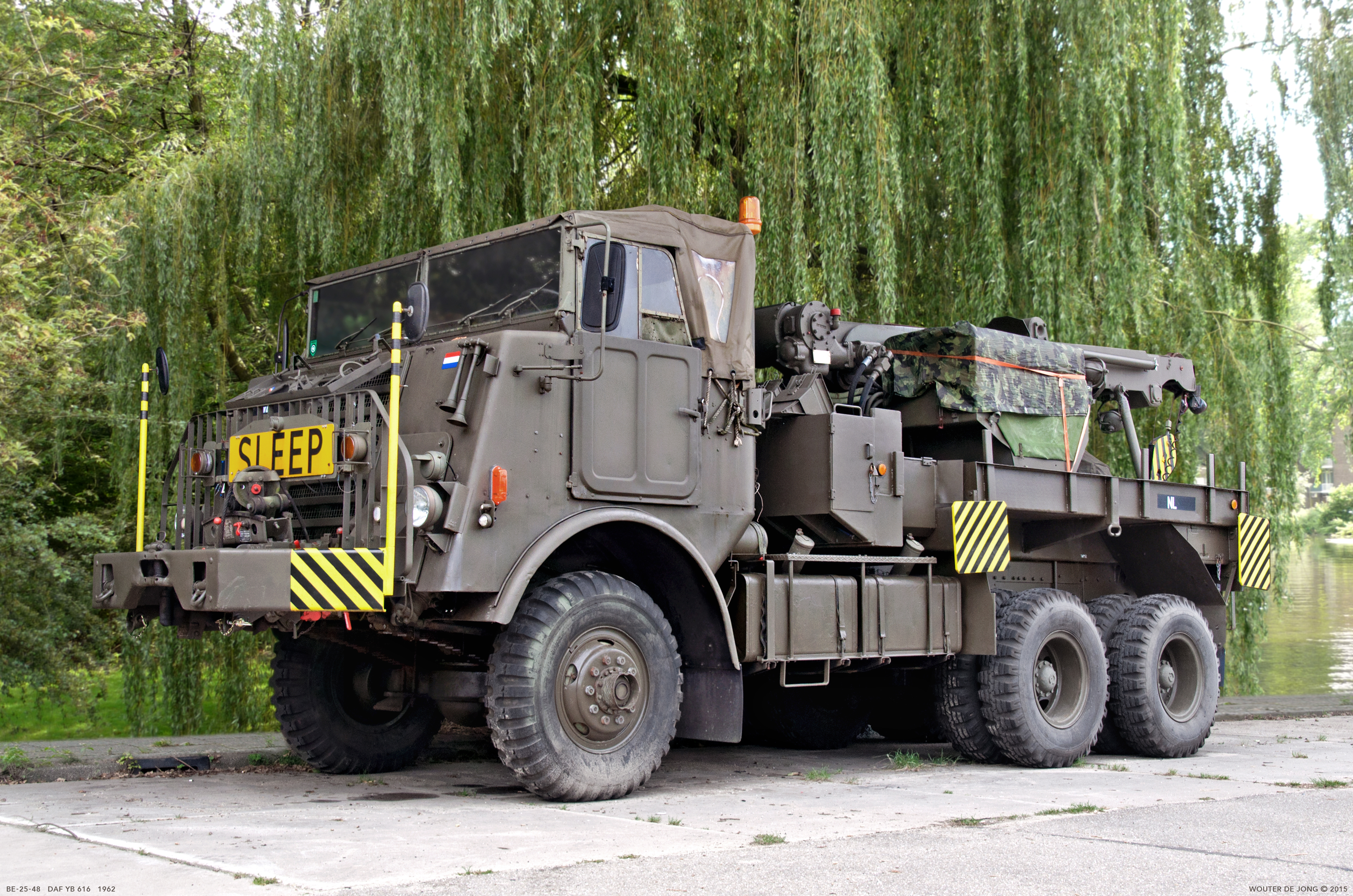 Ex. Koninklijke Landmacht Bergingsvoertuig Kraan : Austin-Western Motor : Continental Red Seal R. 9.9 L, V6, 204 hp at 2800 rpm 6 tons, 6x6 Brandstofverbruik : 1/1